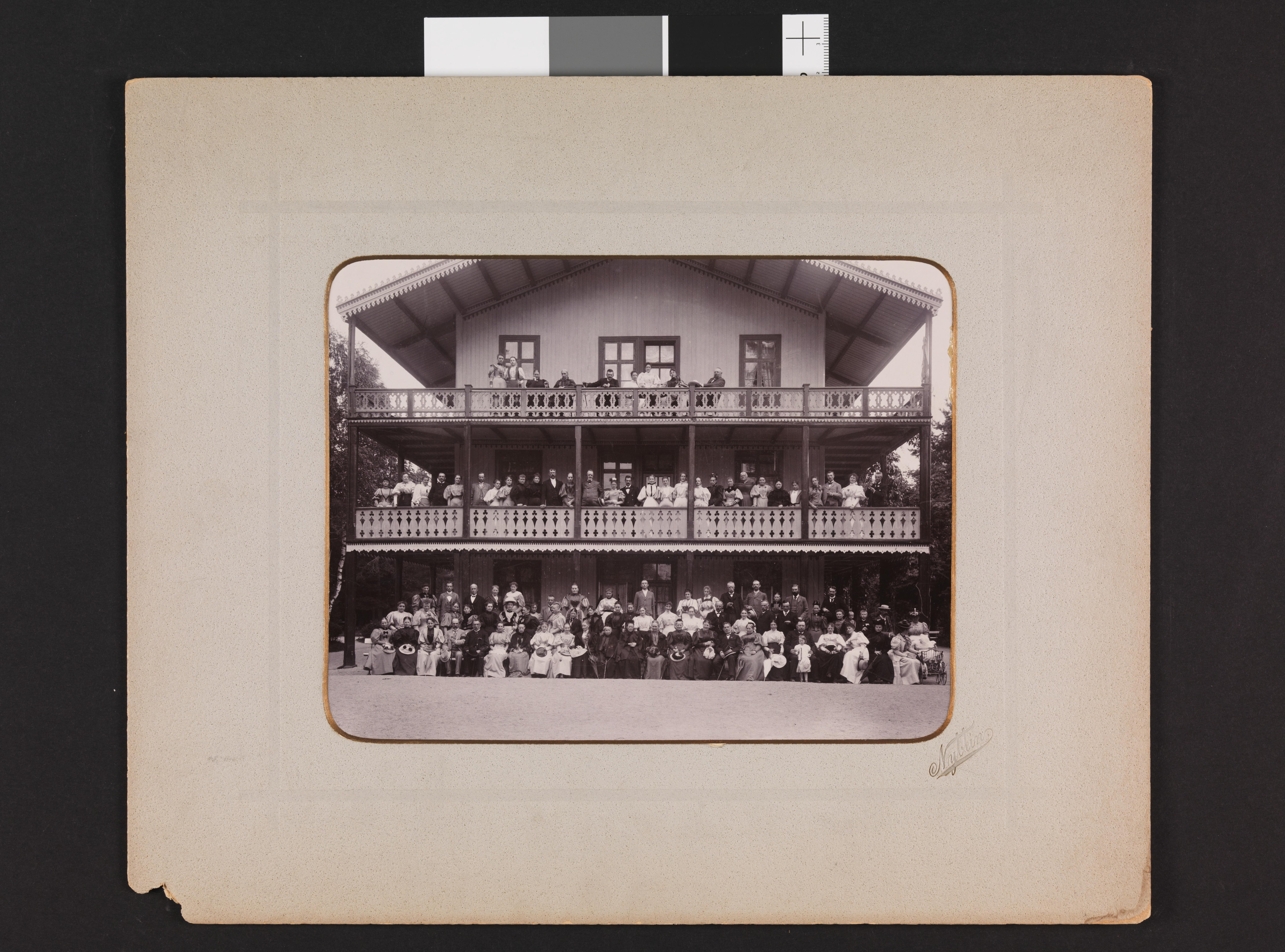 Bildet er hentet fra Nasjonalbibliotekets bildesamling. Anmerkninger til bildet var: Tittel hentet fra påskrift på komponentnr 1 Modum bad, Modum, Buskerud